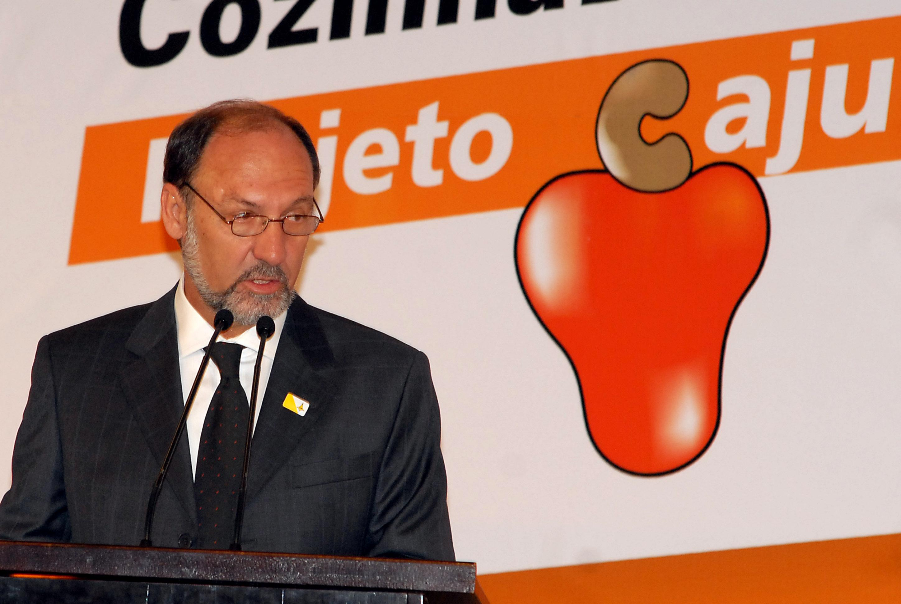 Brasília - O presidente do Conselho Nacional do Sesi, Jair Meneguelli, discursa durante o lançamento do Projeto Caju, do Sesi, que estimula o aproveitamento integral da fruta em refeições de baixo custo e alto valor nutritivo